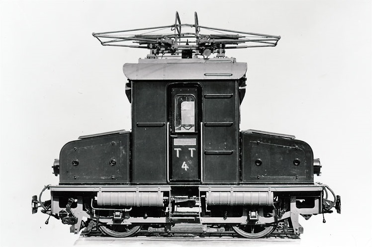 Werkaufnahme der elektrischen Lokomotive Ge 2/2 Nr. 4 der Tramelan–Tavannes-Bahn (TT).